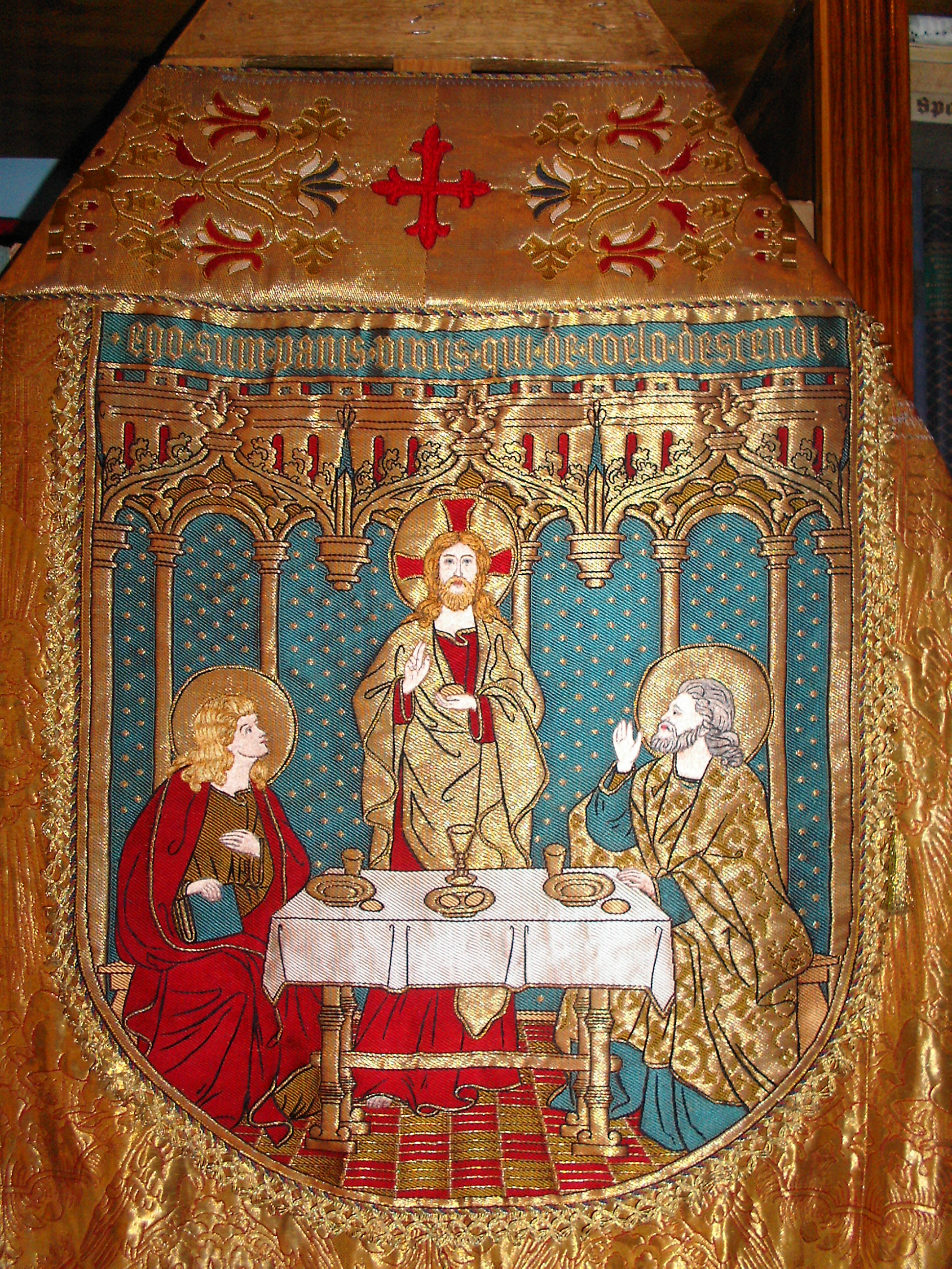 Pluviale um 1890, Rückenschild mit Emmausszene, aus dem Kloster Oggersheim (Pfalz), heute Stiftskirche Neustadt an der Weinstraße